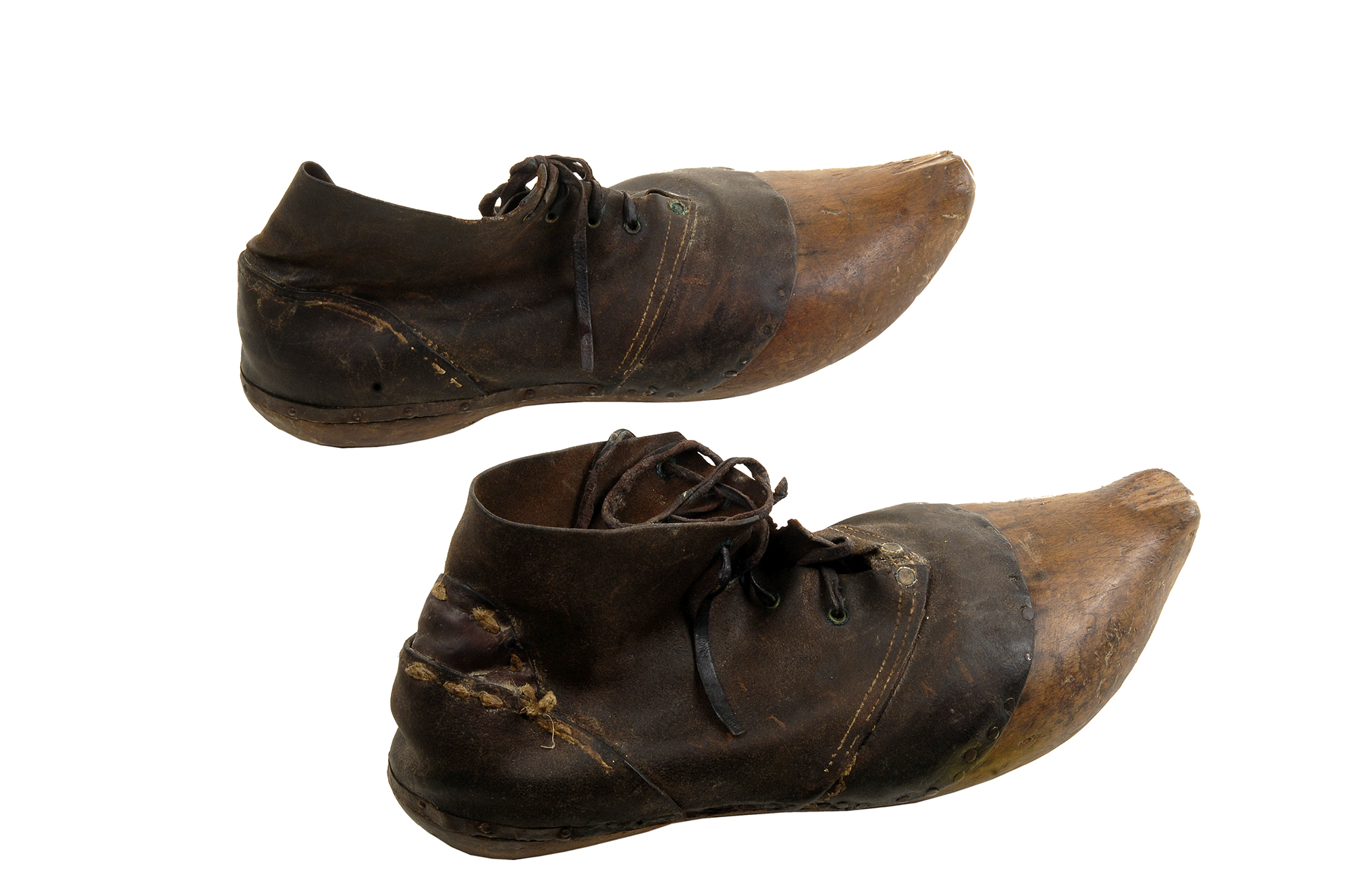 Fotografies dels objectes de l'exposició permanent de la sala "Secà i Muntanya" del Museu Valencià d'Etnologia - Fotografies de Mateo Gamon. Xavoc. Calcer amb sola de fusta. Torreblanca, principis del XX.